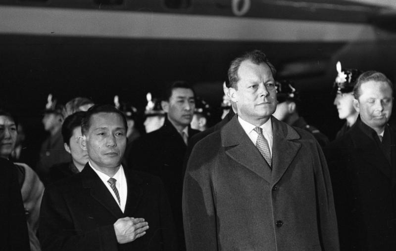 Berlin (West) Staatsbesuch Korea, General Park Ankunft: Flughafen Tempelhof (rechts: Willy Brandt)